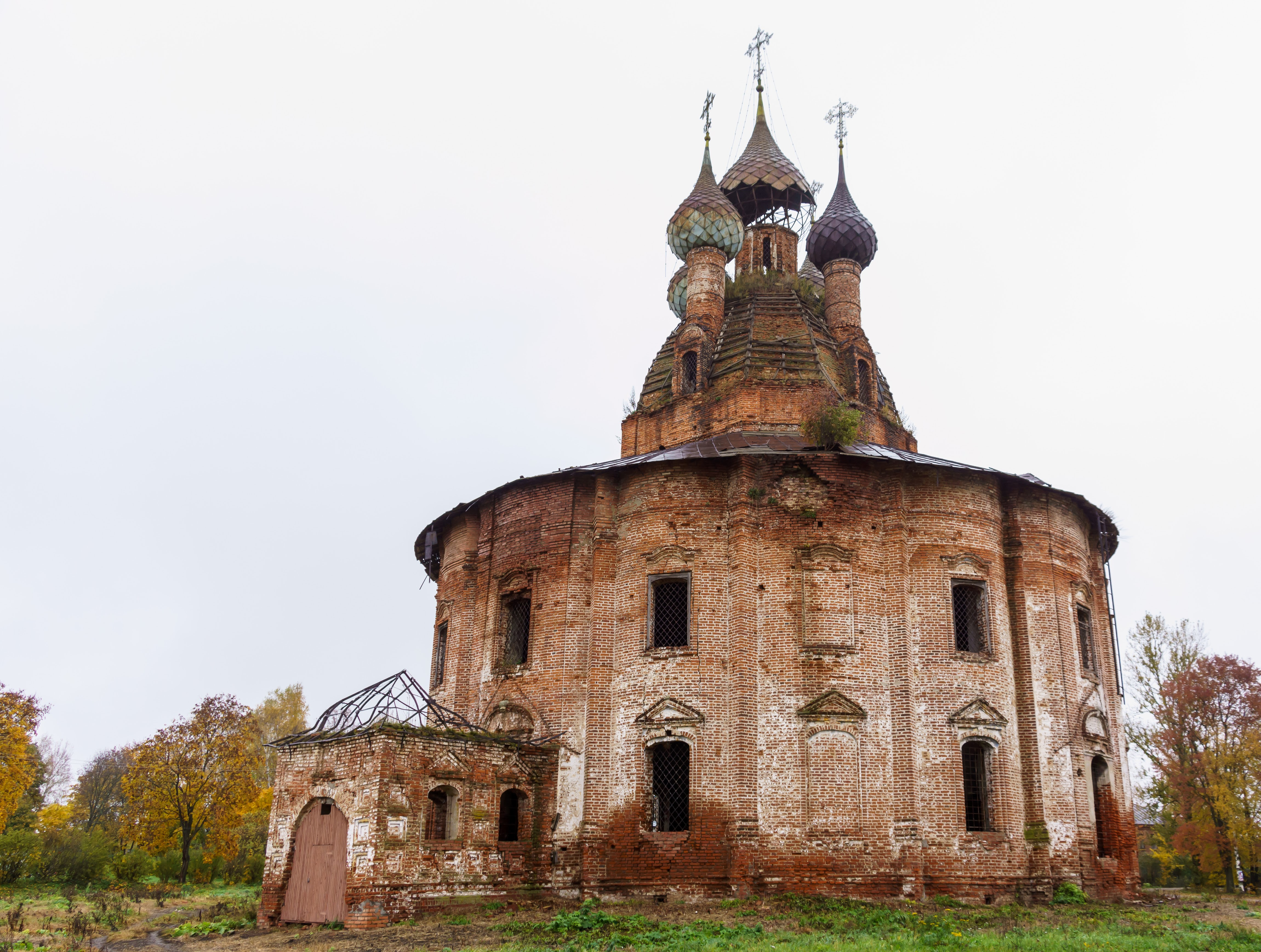 Казанская церковь: Курба, Ярославский район, Ярославская область